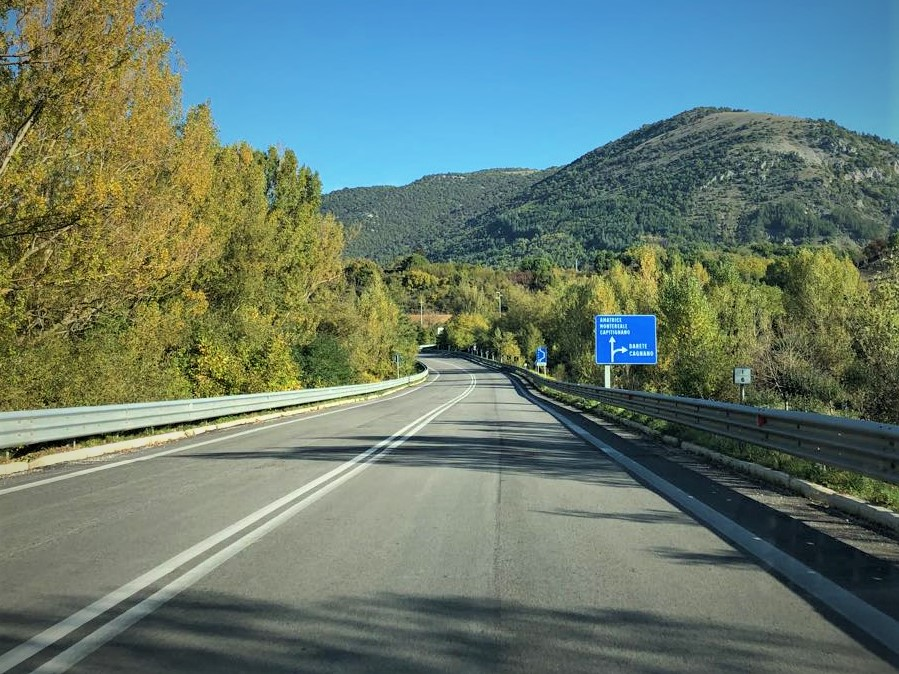 SS 260 Picente in corrispondenza di San Pelino (Cagnano Amiterno).